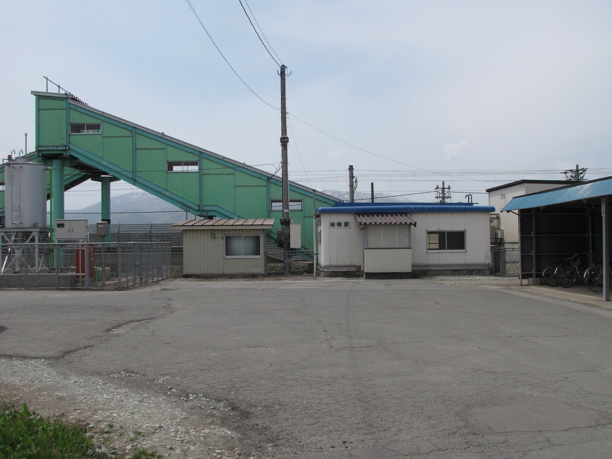 袖崎駅 駅前